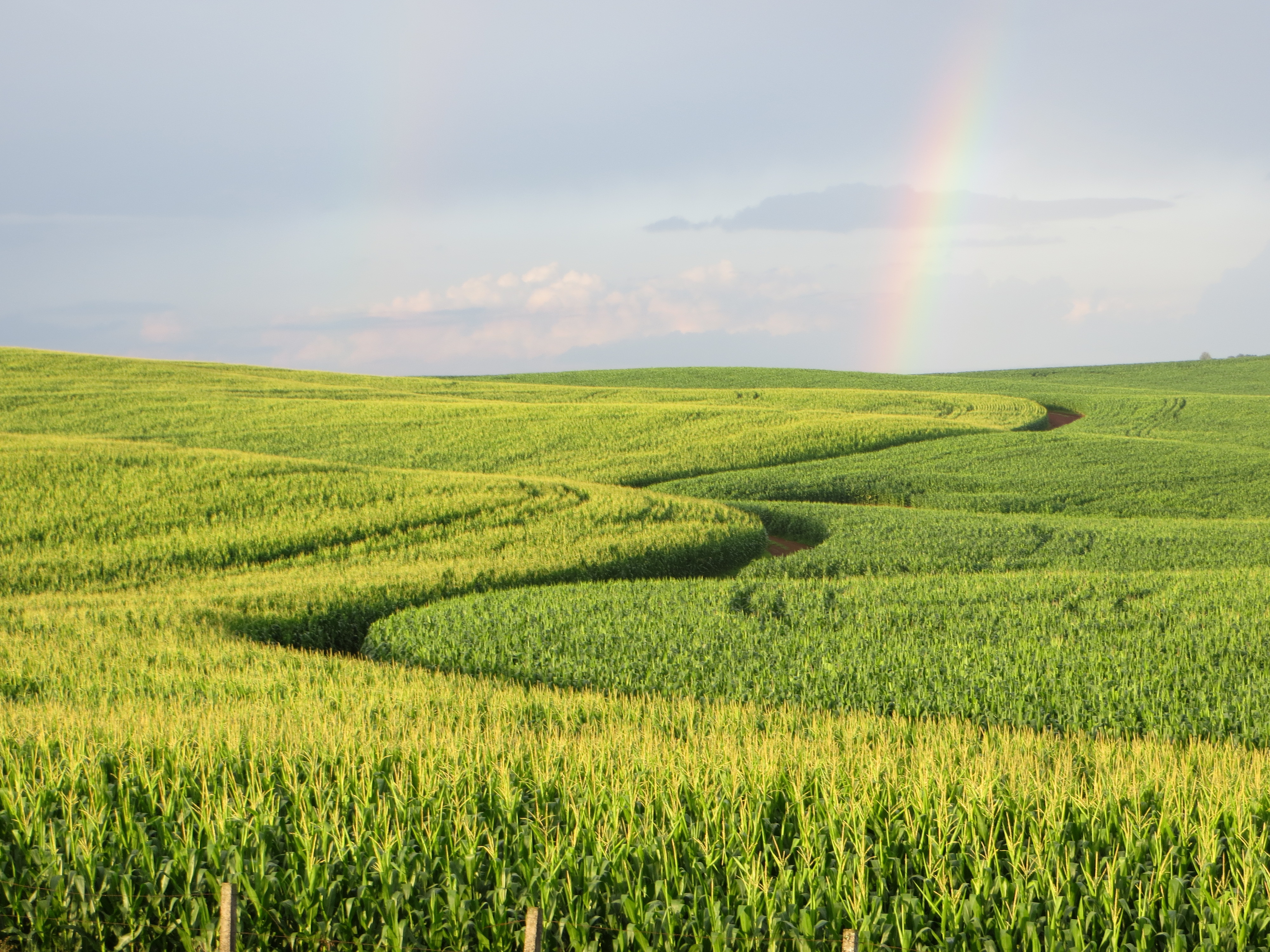 Plantação de trigo em Guarapuava (PR), Brasil.